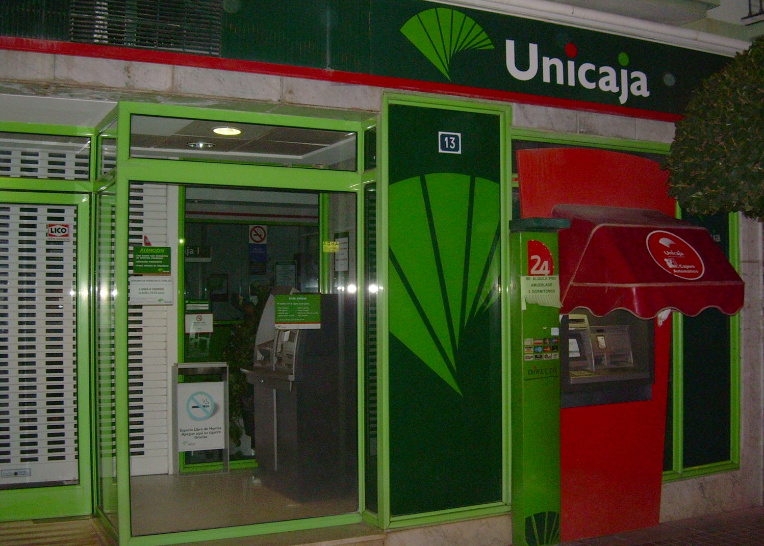 Sucursal de la Caja de Ahorros Unicaja, en Avda de Cristobal Colón, Alhaurín de la Torre, Málaga, España